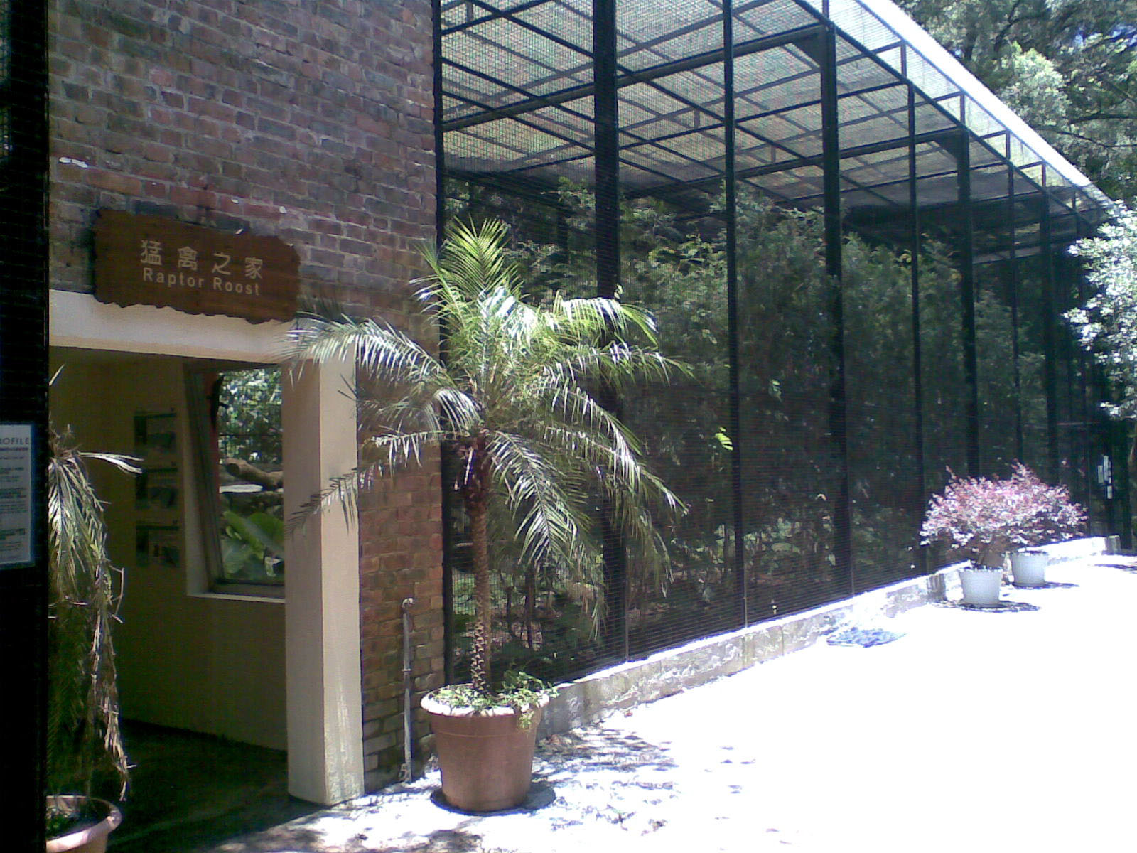 中文（香港）: 嘉道理農場暨植物園猛禽之家